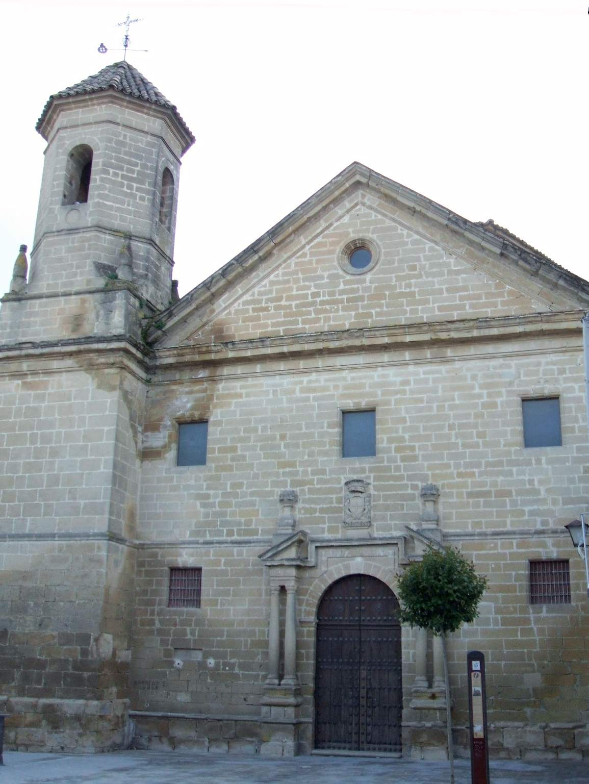 Baeza - Iglesia de los Trinitarios Descalzos